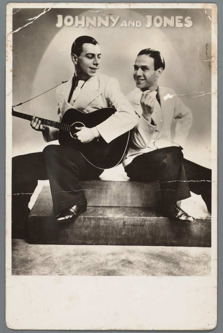 prentbriefkaart met foto het duo Johnny and Jones, ca. 1938